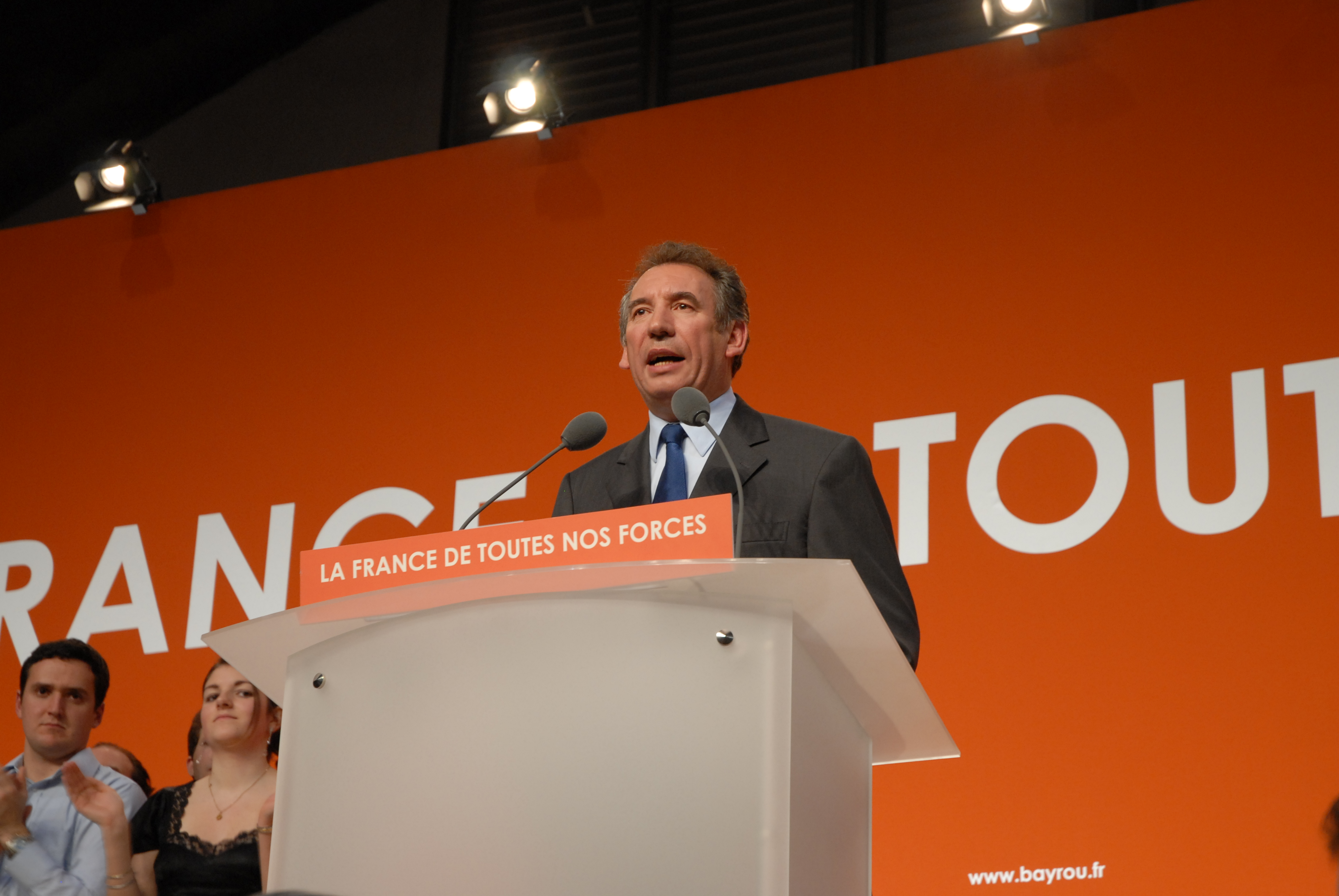 François Bayrou en meeting politique à Toulouse